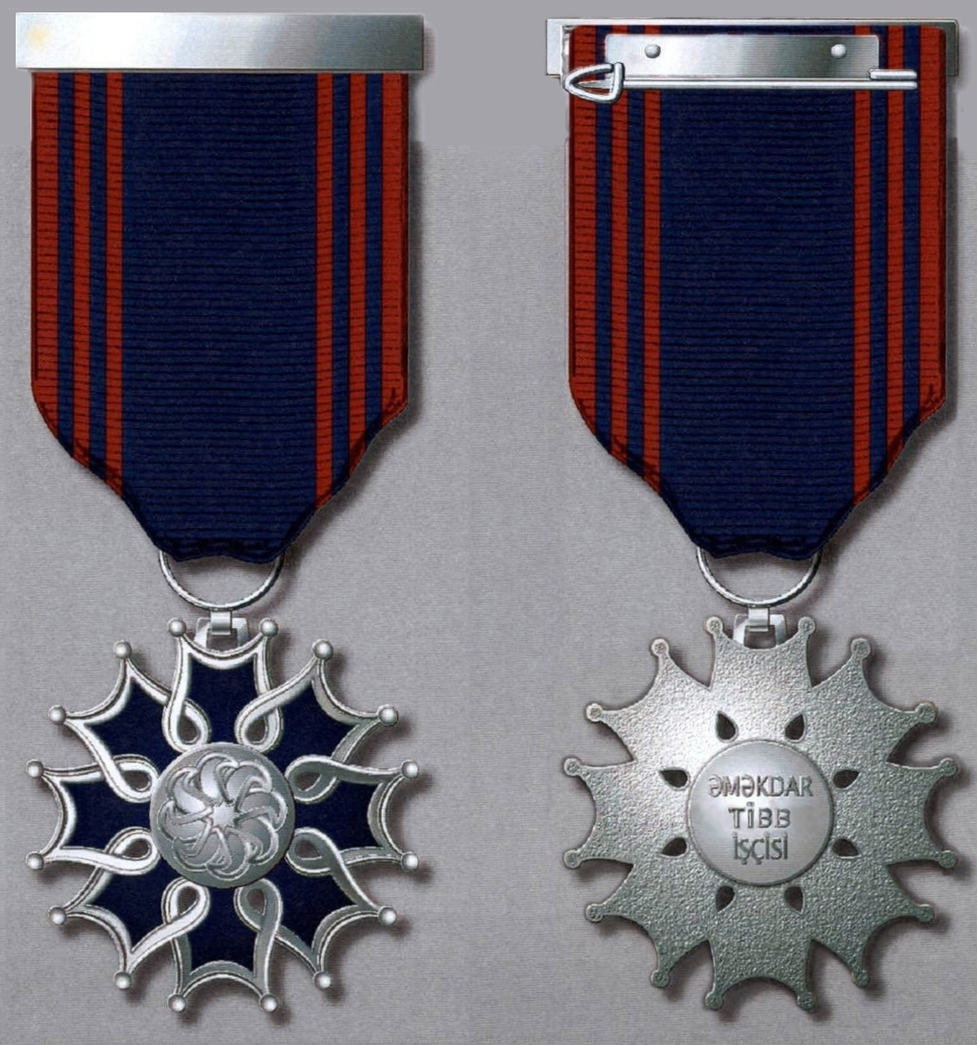 “Əməkdar tibb işçisi” fəxri adının döş nişanı